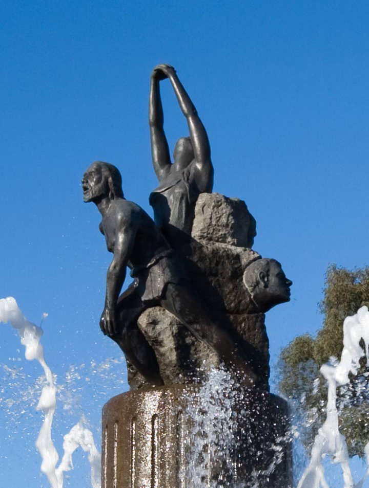 Monumento a Doramas - Autor Jose Luis Marrero - Arucas, Gran Canaria